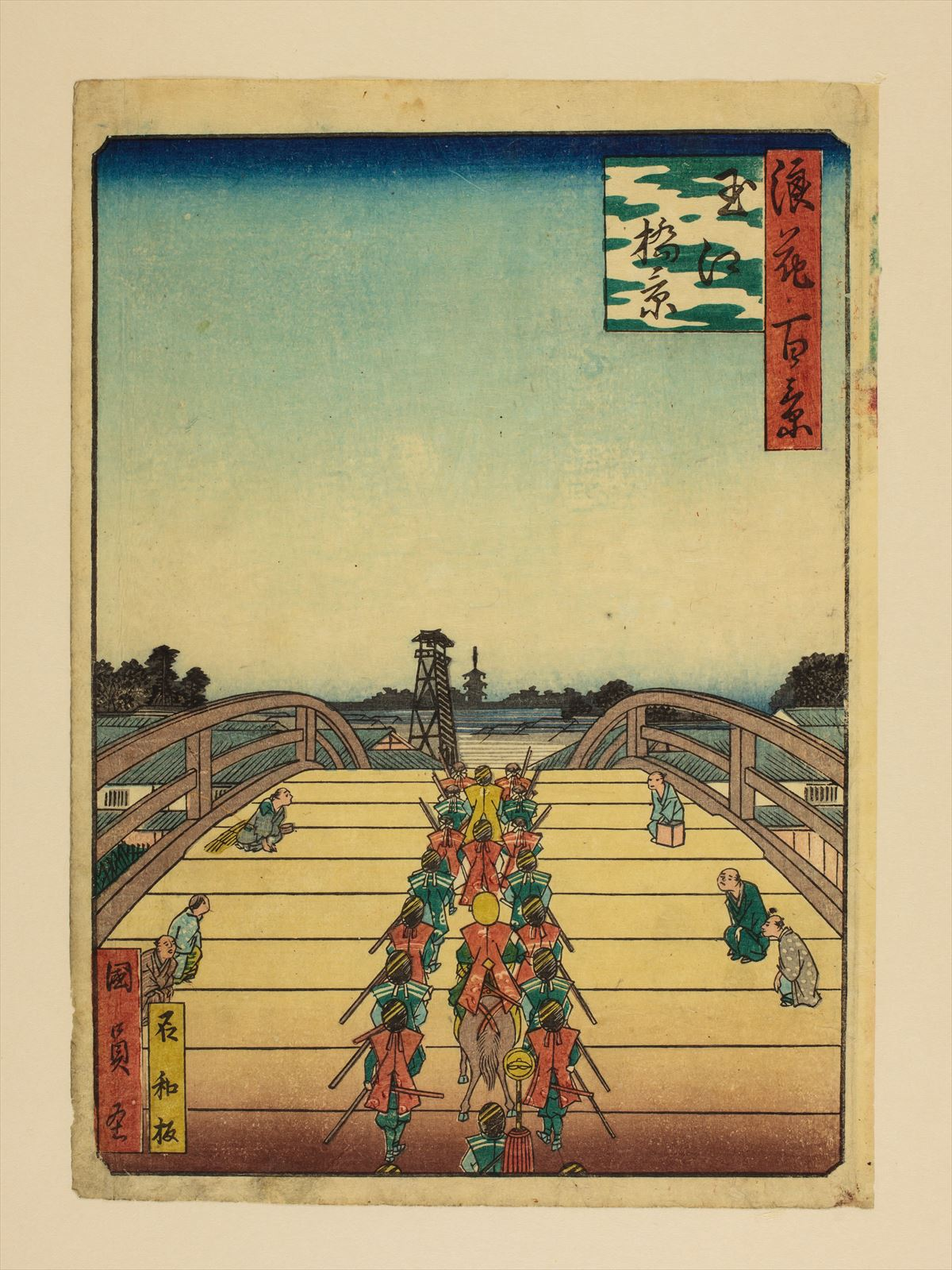 1800年代。歌川國員/画。浪花百景 102枚のうちの1枚。大阪市立中央図書館蔵。